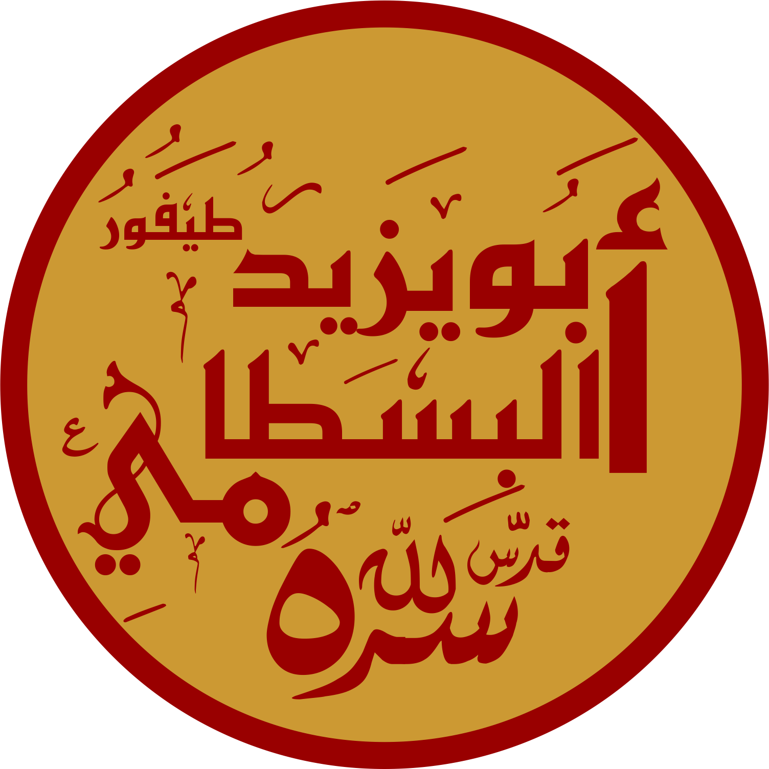 ABU YAZID